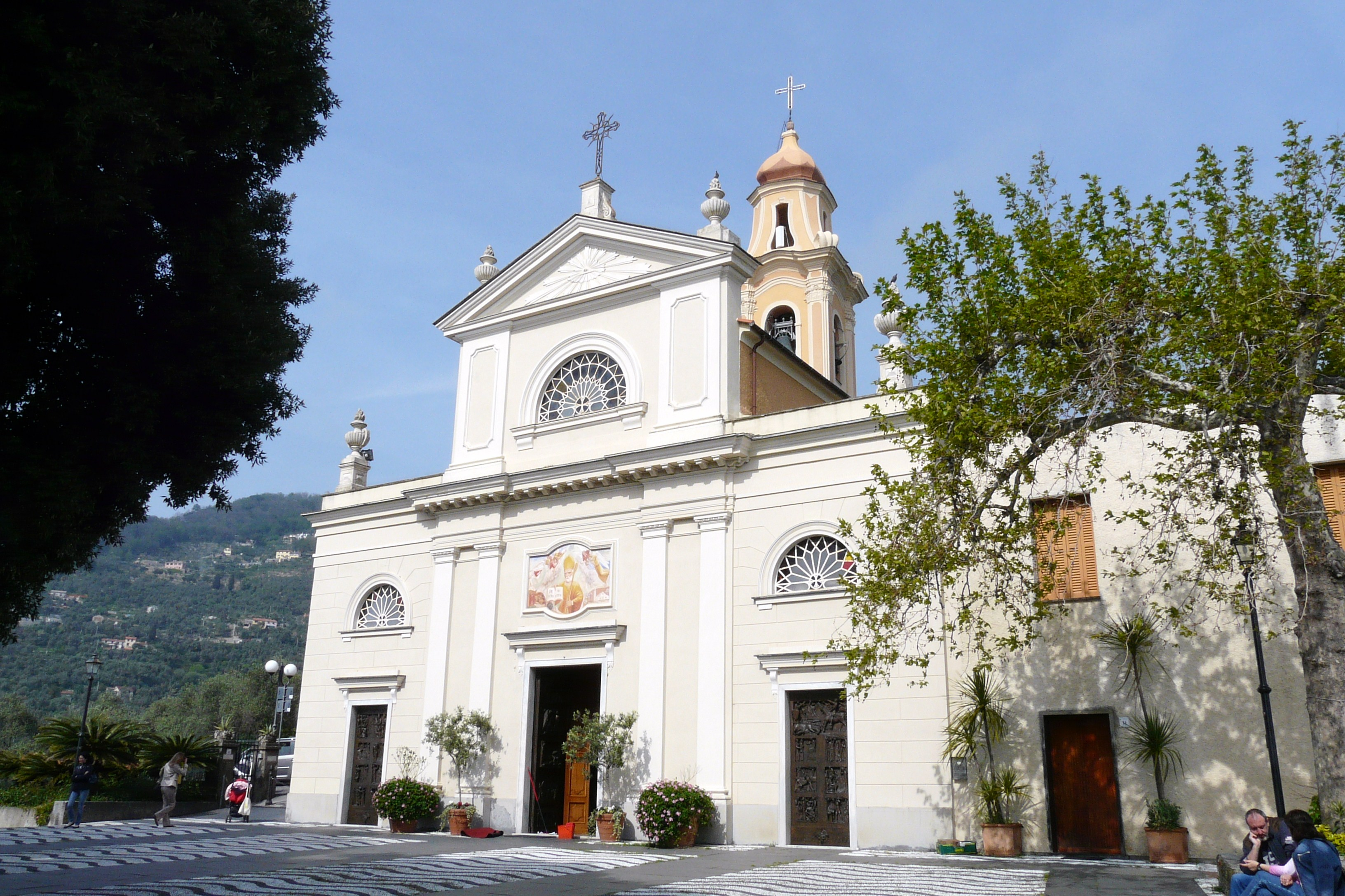 Chiesa di Sant'Ambrogio, Zoagli, Liguria, Italia